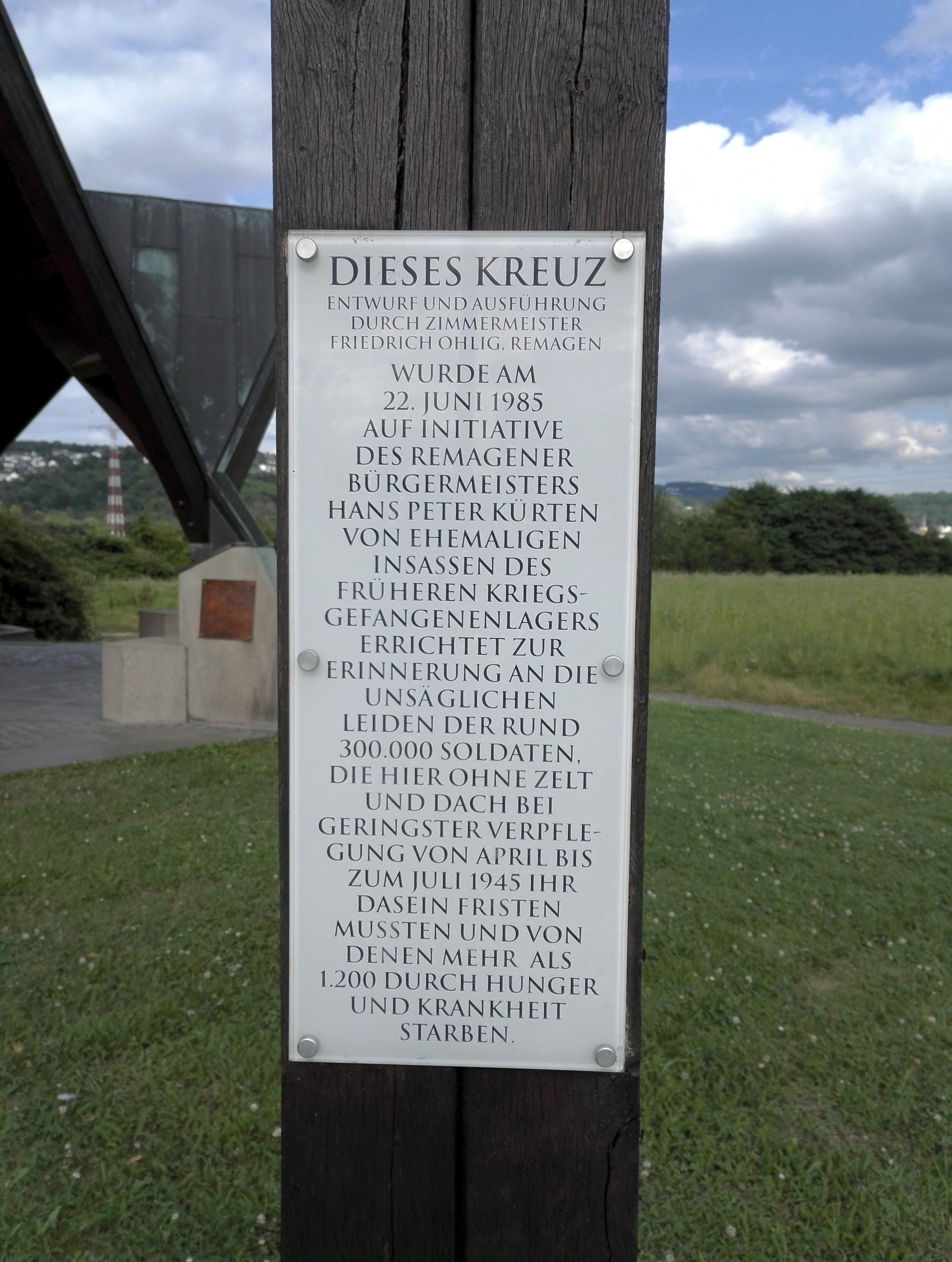 Texttafel Kreuz an Friedenskapelle Schwarze Madonna, Remagen